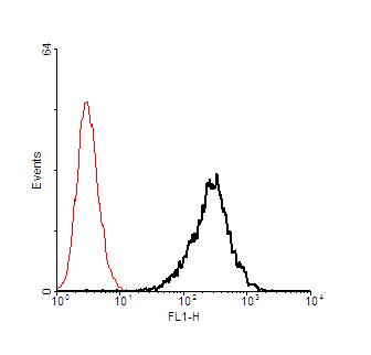 Flow Cytometry- מציאת חלבון ממברנלי בעזרת ציטומטרית זרימה, הניסוי מורכב משתי דוגמאות תאים, הדוגמה החיובית (בשחור) נחשפה לנוגדן נגד החלבון הממברנלי LY-6, ולאחר מכן לנוגדן שניוני (נגד הנוגדן הראשוני) מצומד למולקולה פולוסנטית. הדוגמה השלילית לא נחשפה לנוגדן ראשוני. כל דוגמה מורכבת מחמשת אלפים תאים. ציר X בגרף מציין את כמות הפלורוסנסיה הנפלטת מן התא, ציר Y מציין את מספר התאים. התוצאות מראות כי תאים מן הקבוצה החיובית פולטים יותר פלורוסנסיה מן התאים השליליים.